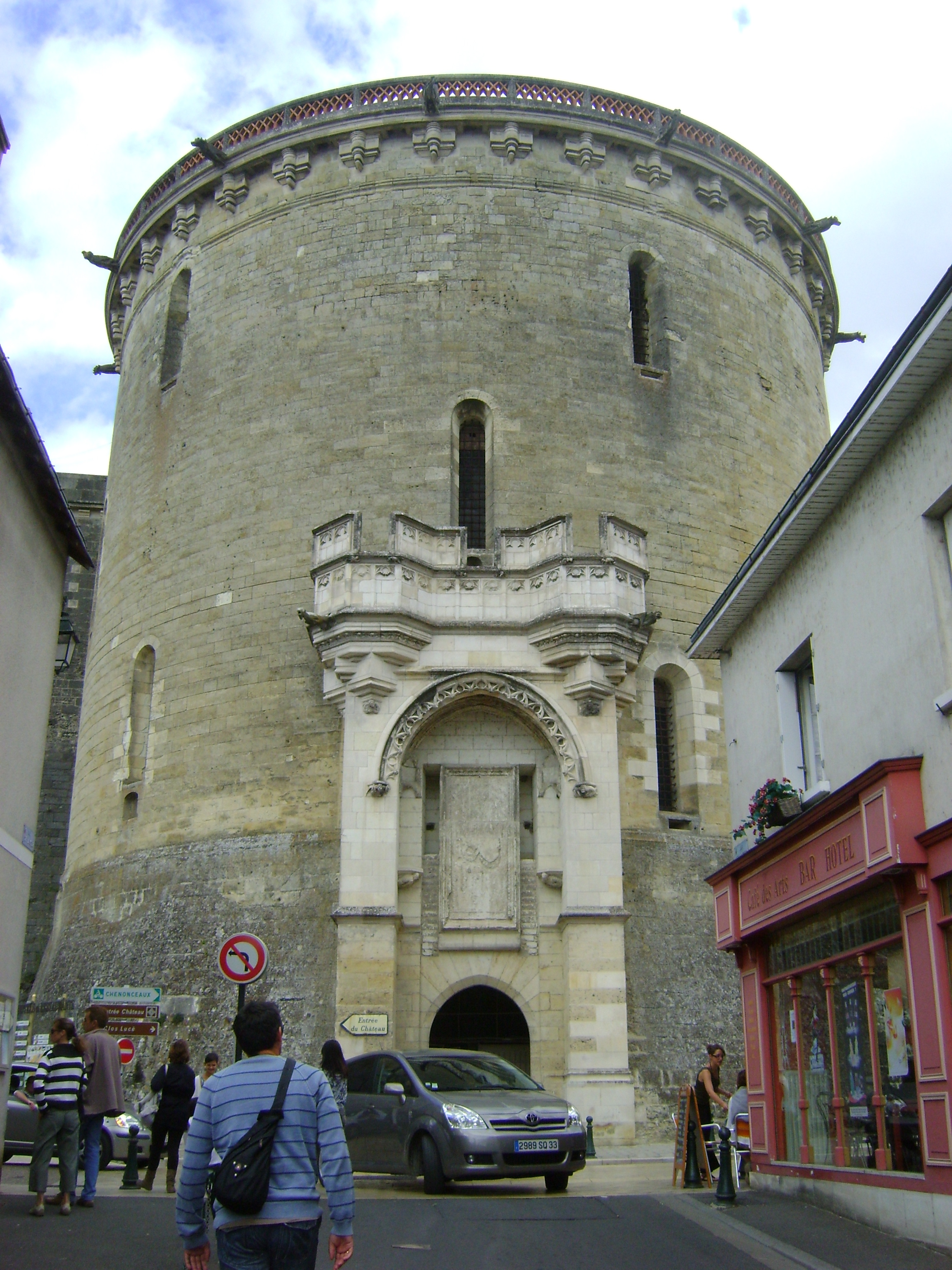 Schloss Amboise, Heurtault-Turm von der Stadt aus gesehen